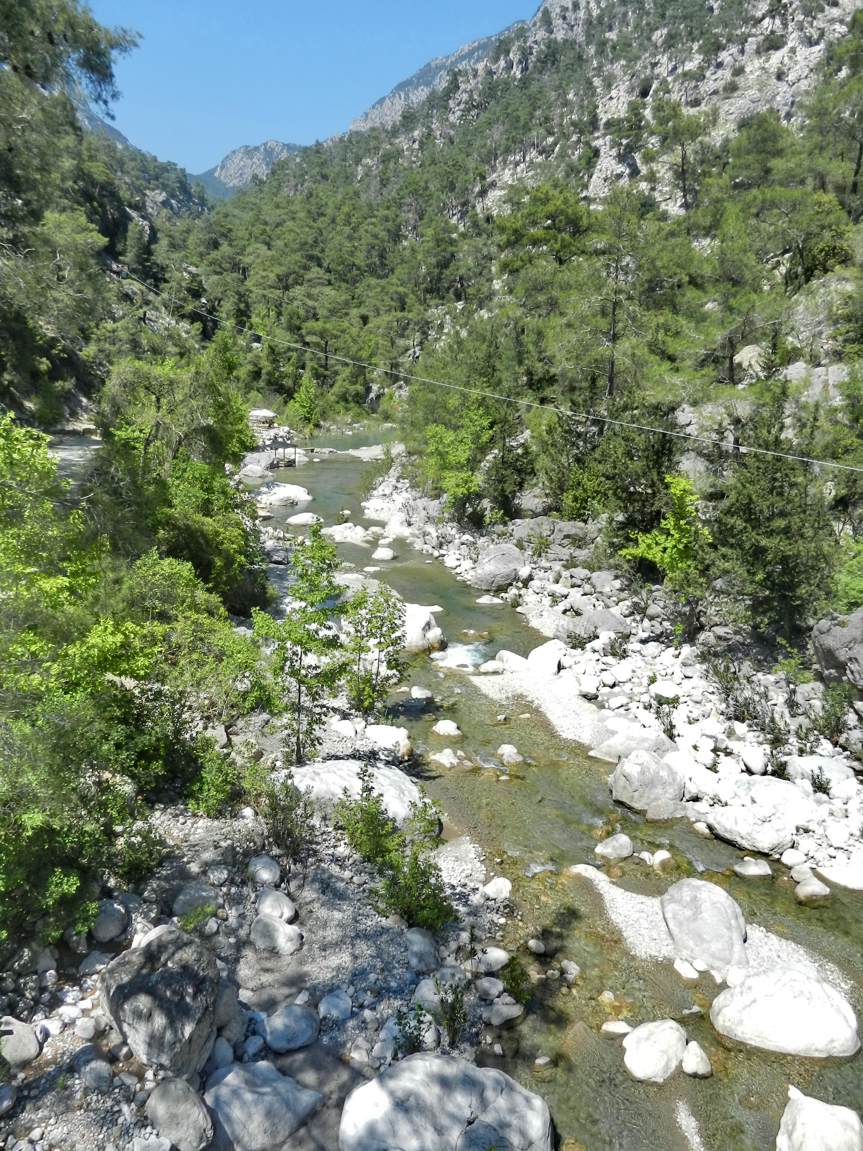 Göynük Kanyon